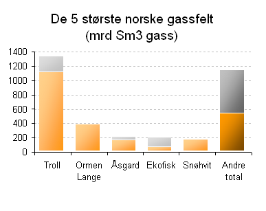 Petroleumsvirksomhet i Norge. Stolpediagram: De 5 største gassfelt på norsk sokkel. Basert på offentliggjorte tall fra Oljedirektoratet pr 8. mars 2006. Indikator for hva som er gjenværende i hvert felt.